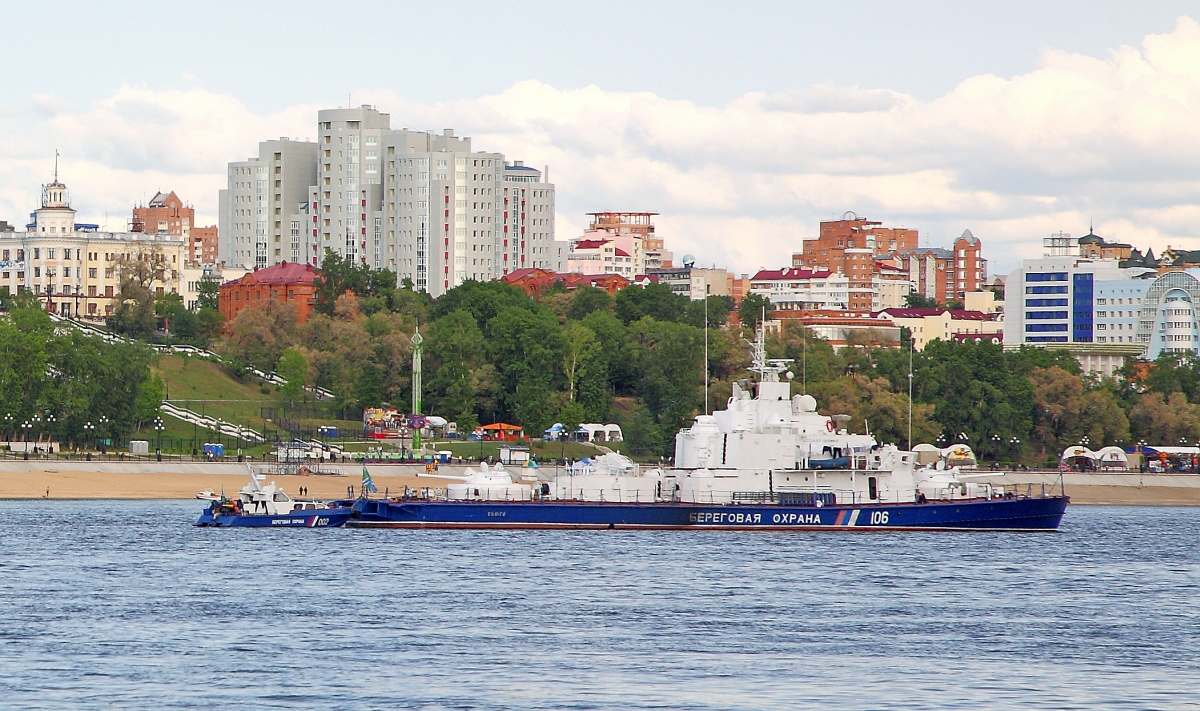 Вьюга (малый артиллерийский корабль пр.1208). Хабаровск 2009.06.02